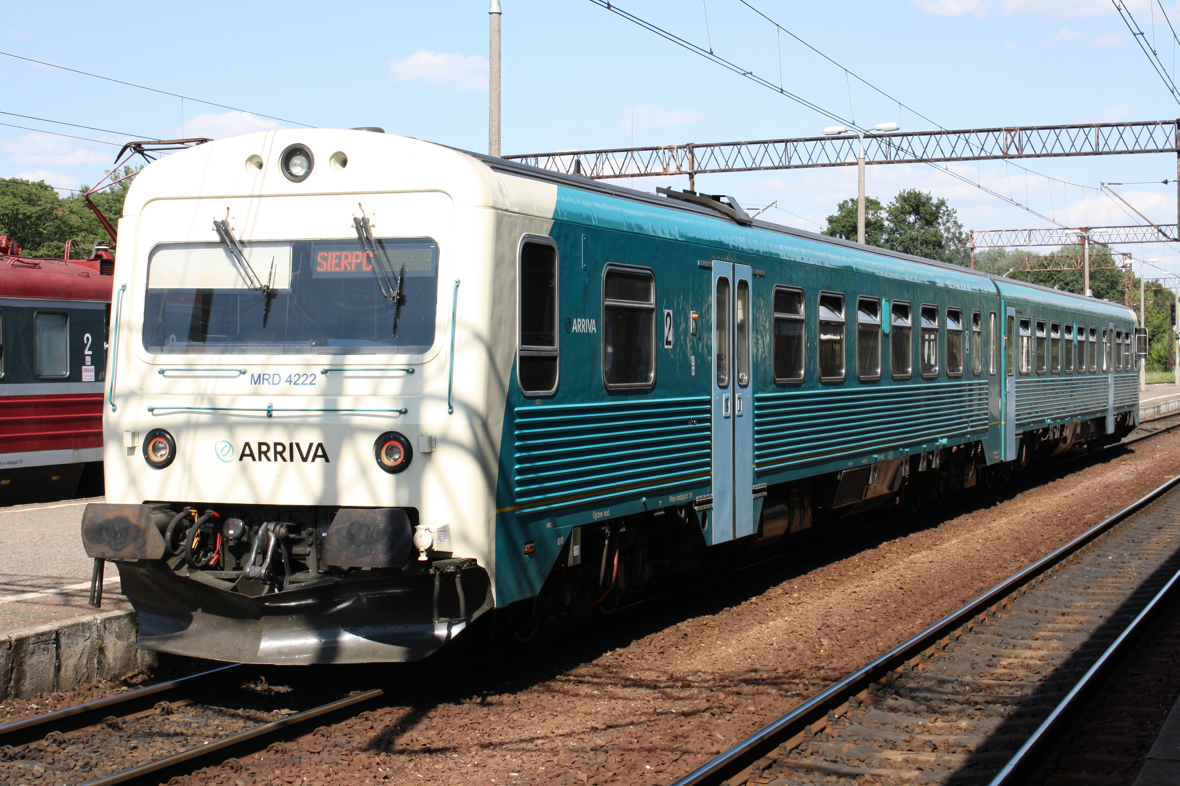 MRD 4222 spółki Arriva PCC na stacji Toruń Główny.)